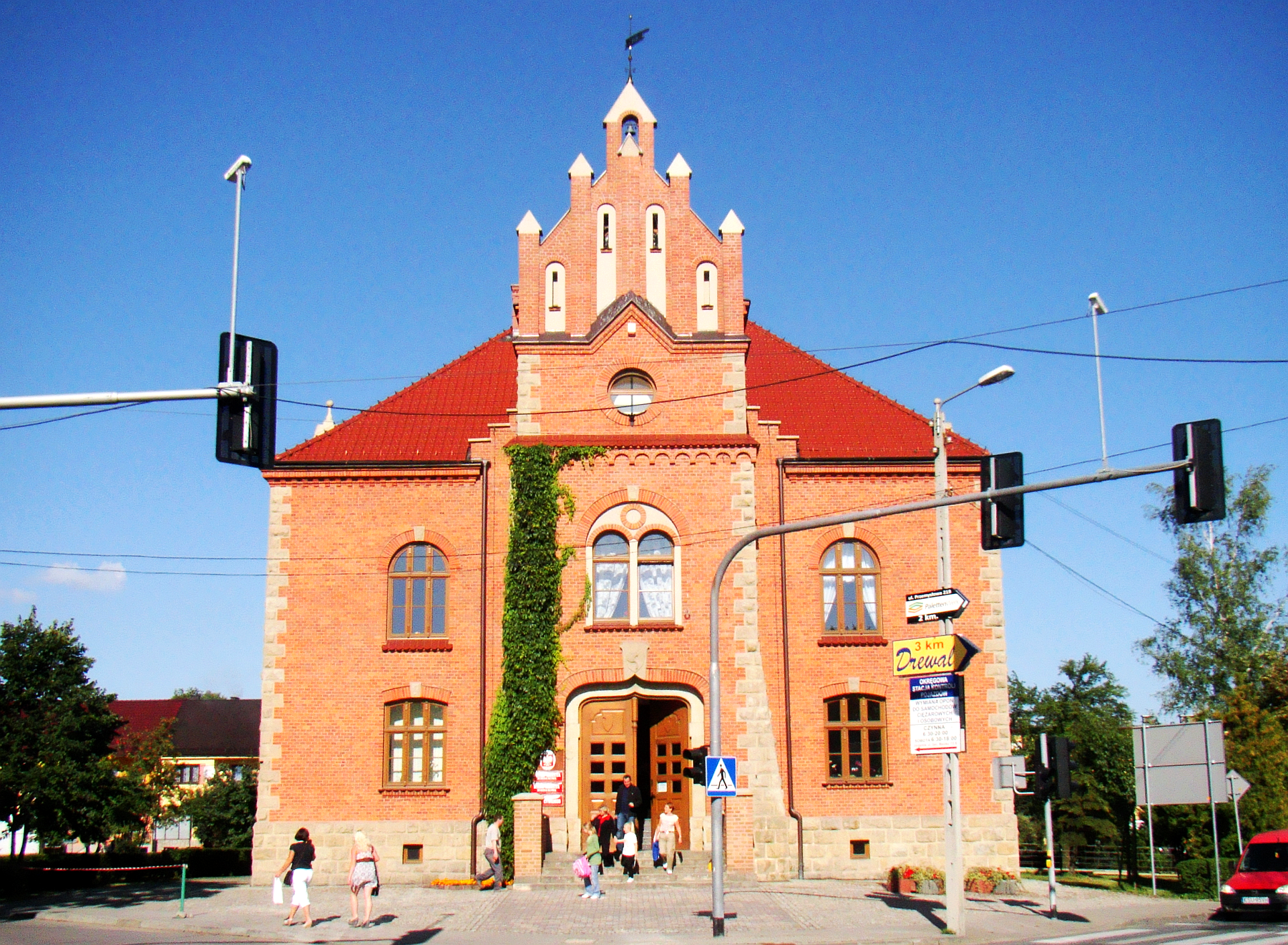 Jordanów, Rynek 1 - ratusz, 1911